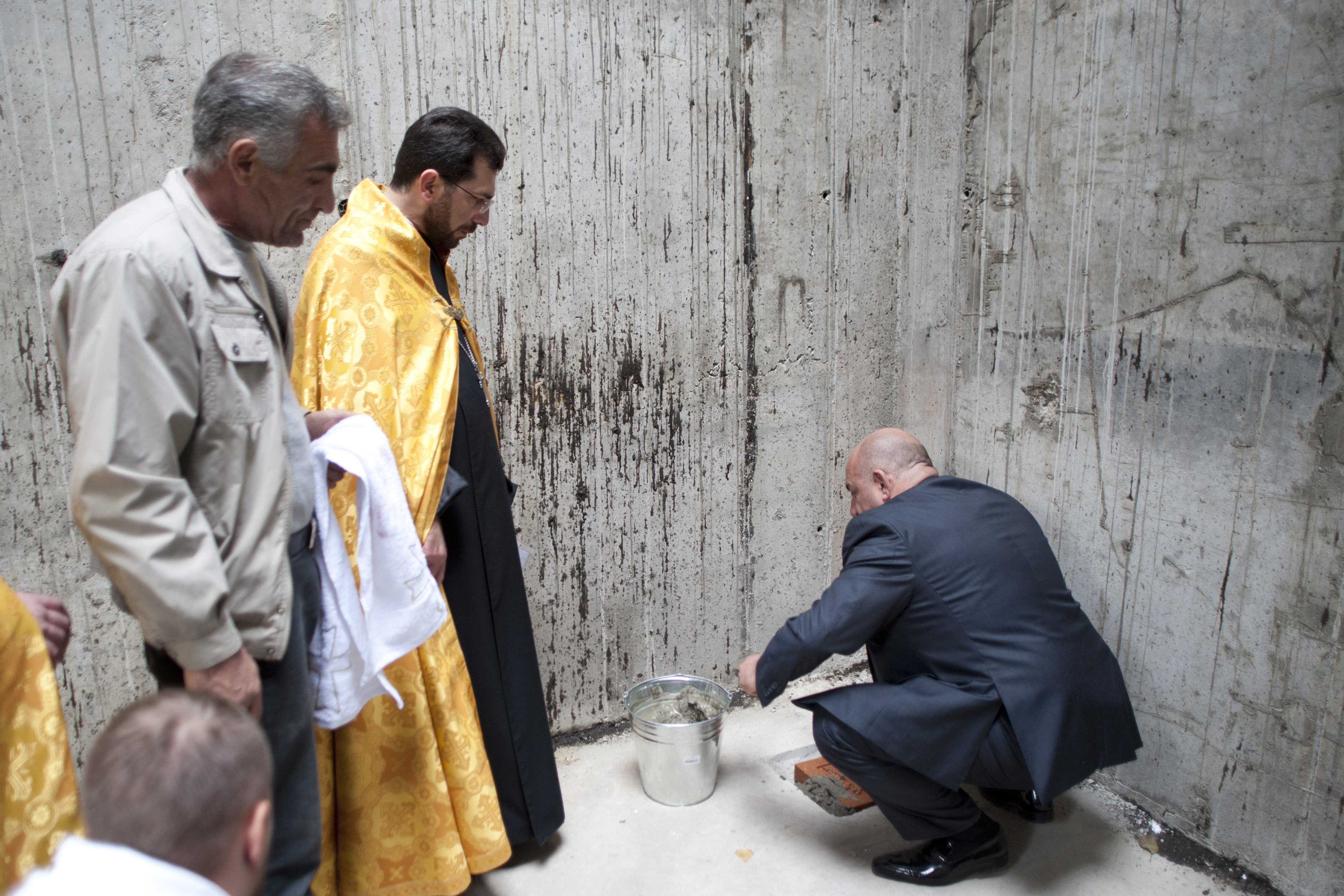 Закладка камня в фундамент храма